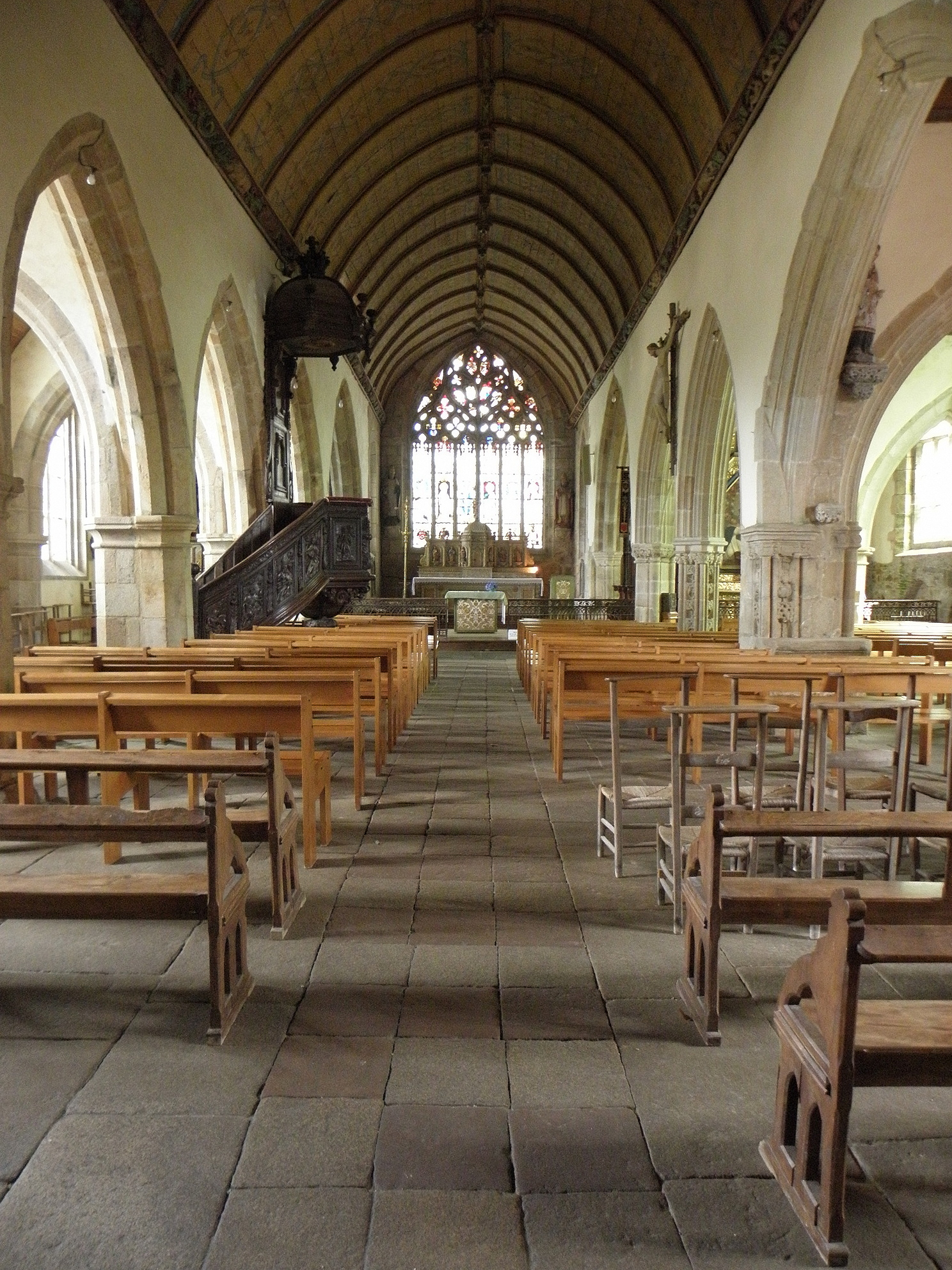 Nef de l'église Notre-Dame de Runan (22). .